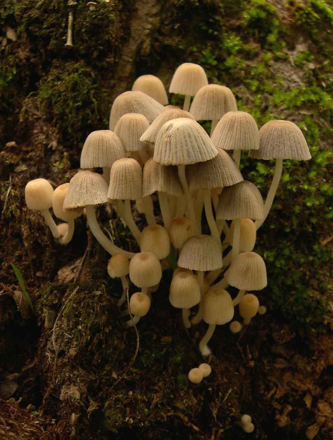 Coprinellus disseminatus (Pers.:Fr.) S.F. Gray, 1821